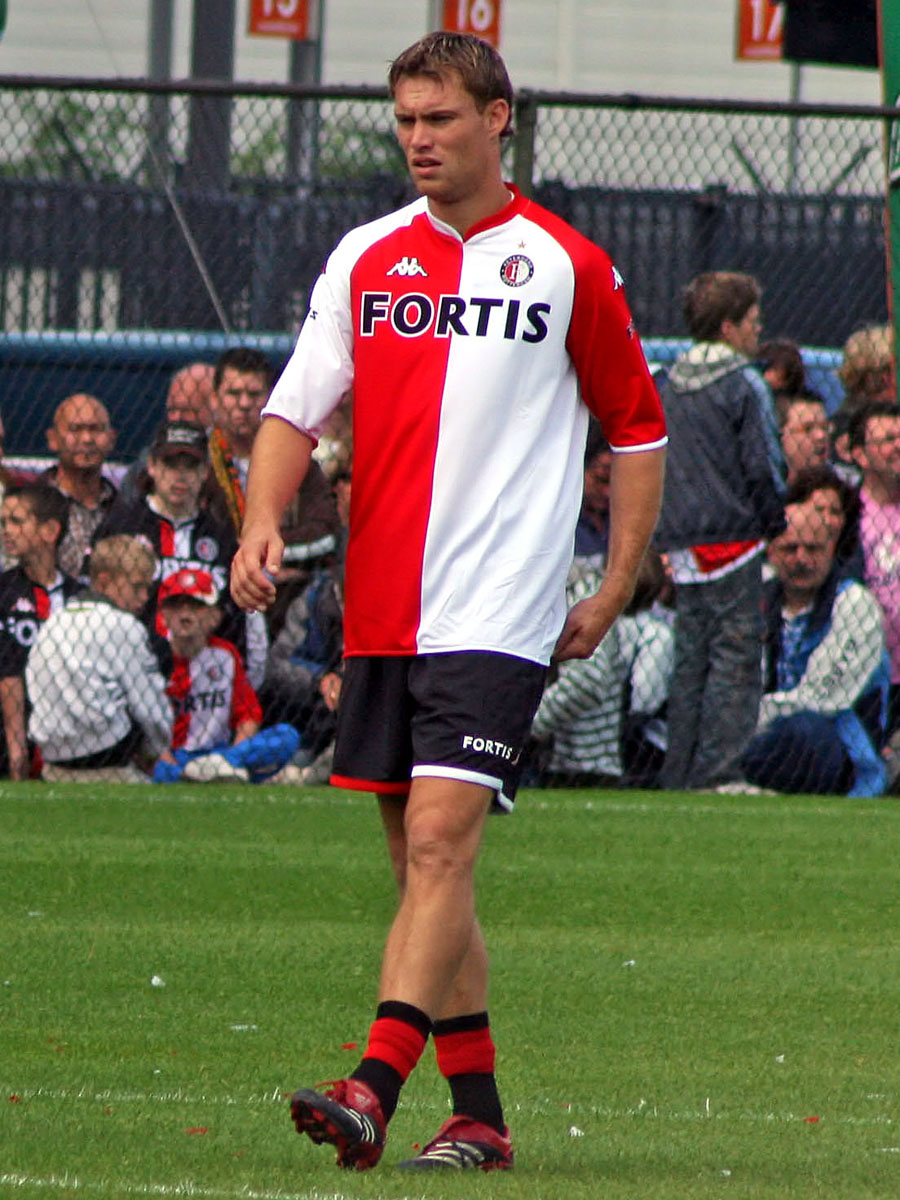 Kevin Hofland (Feyenoord)